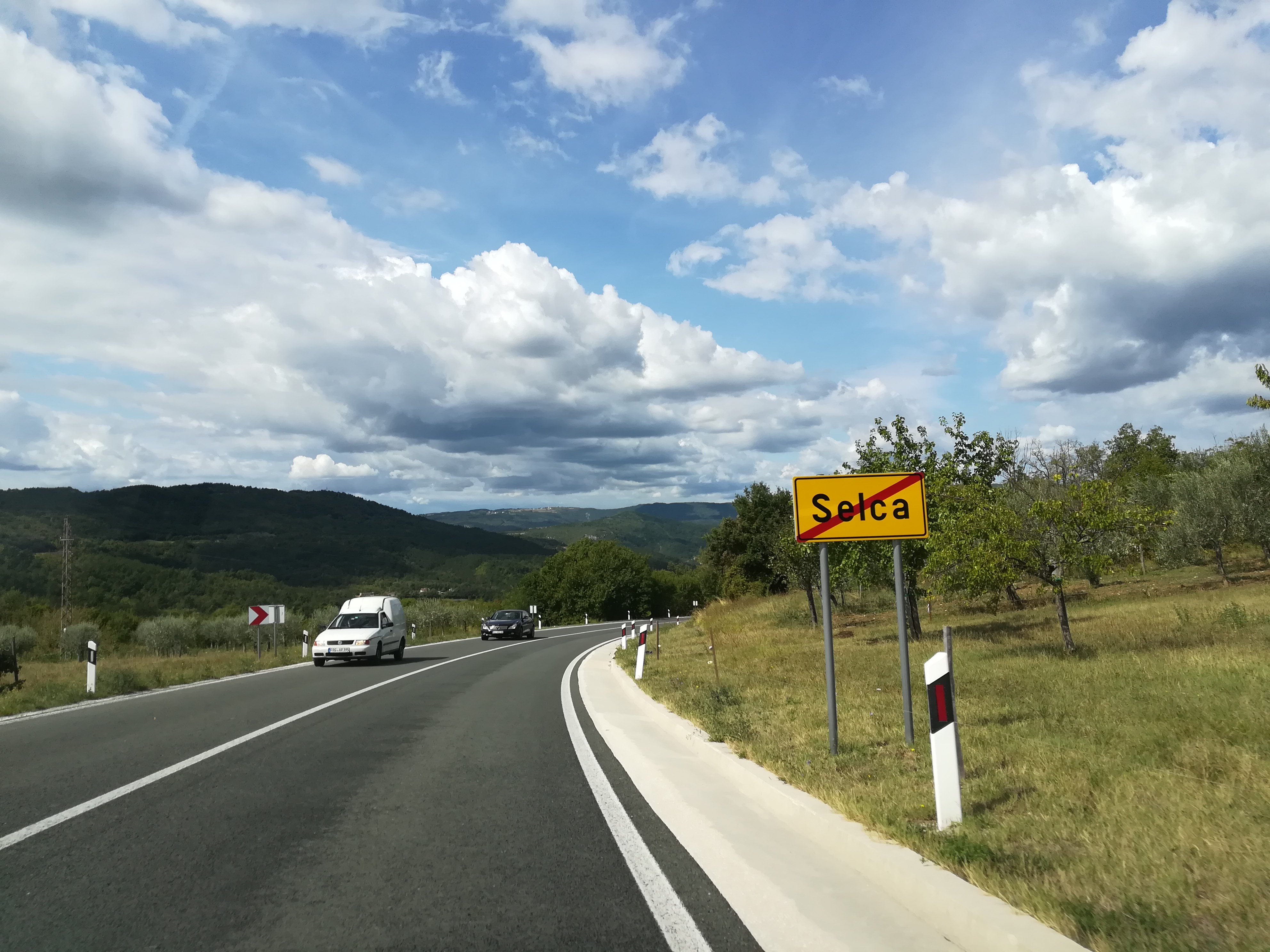 Selca, Pinguente